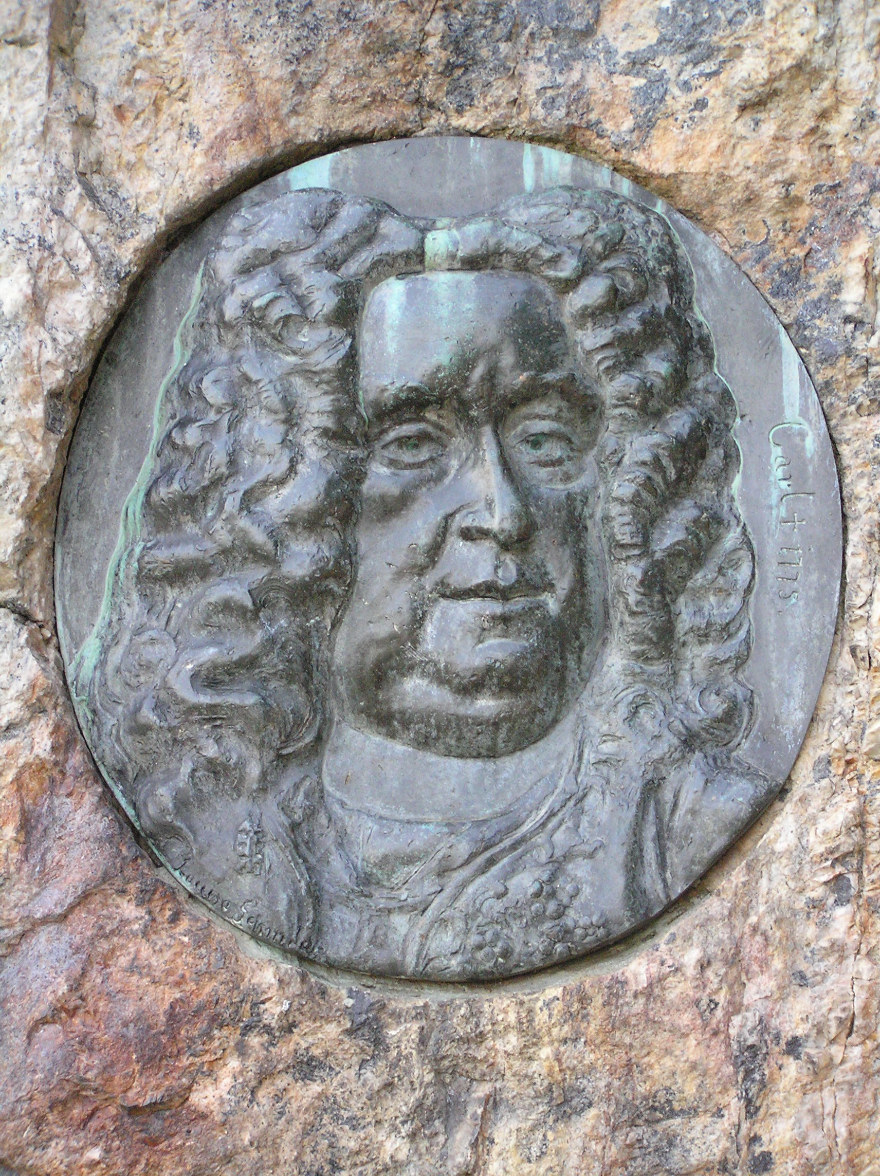 Carl von Usingen-Nassau (Denkmal im Usinger Schlosspark) später Fürst Karl von Nassau-Usingen (31. Dezember 1712 in Usingen; † 21. Juni 1775 in Wiesbaden-Biebrich) war von 1718 bis 1775 Fürst von Nassau-Usingen.